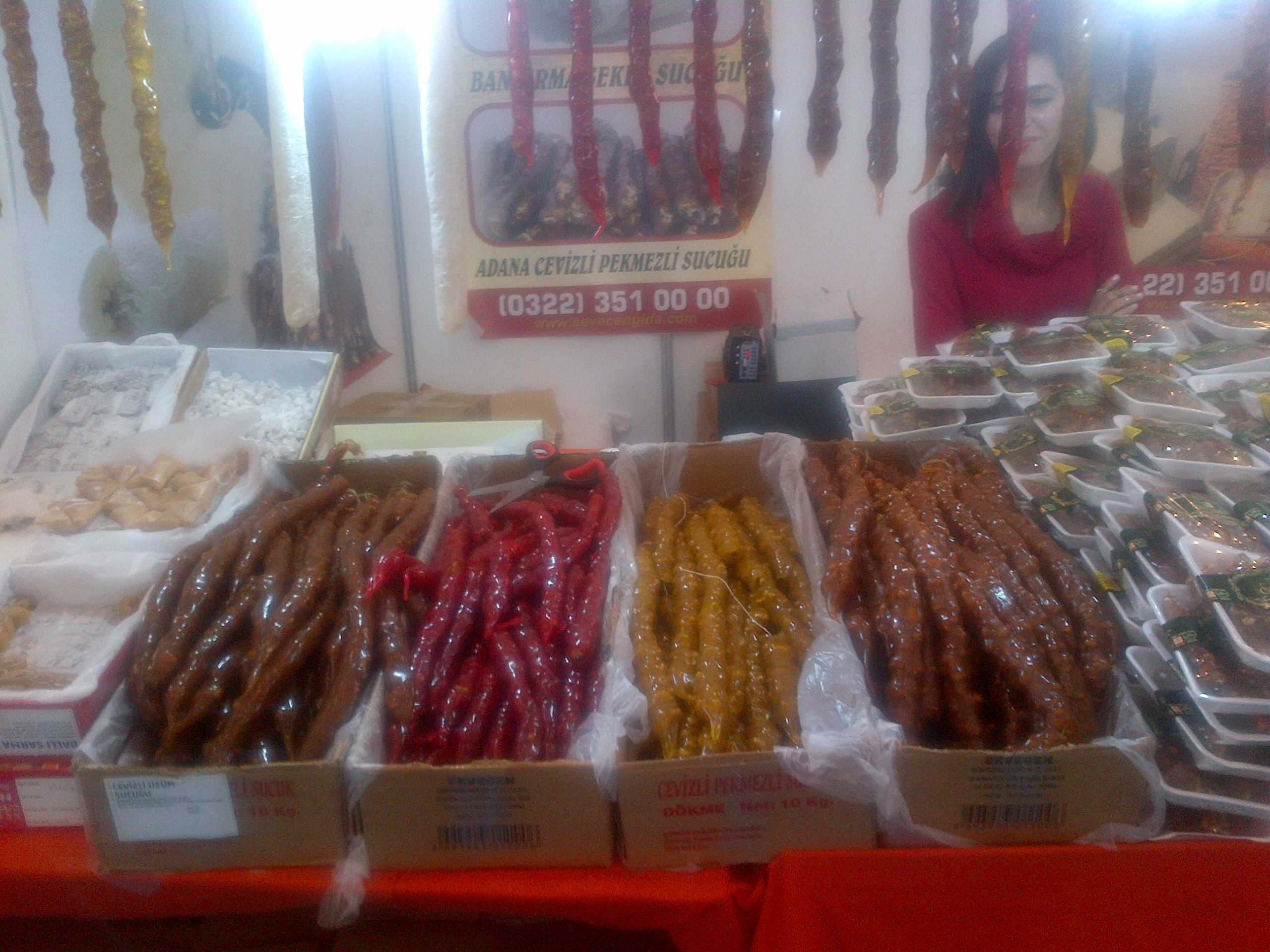 "Cevizli sucuk" - Churchkhela de Turquia